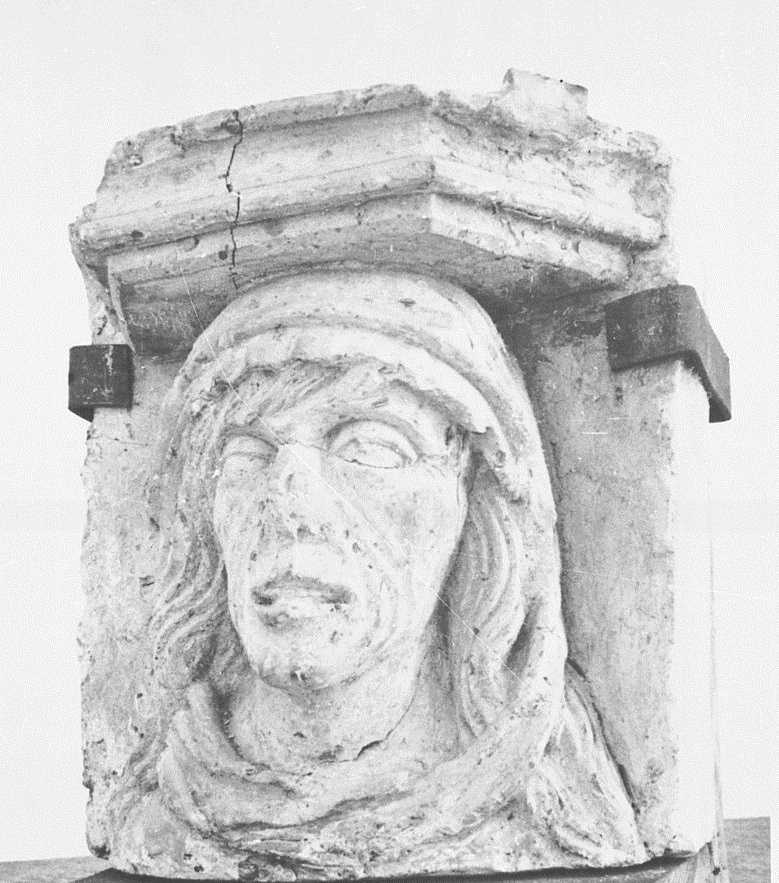 Cette sculpture date de 1390. Elle se trouvait dans la maison des Blankenfeld à Berlin en 1890